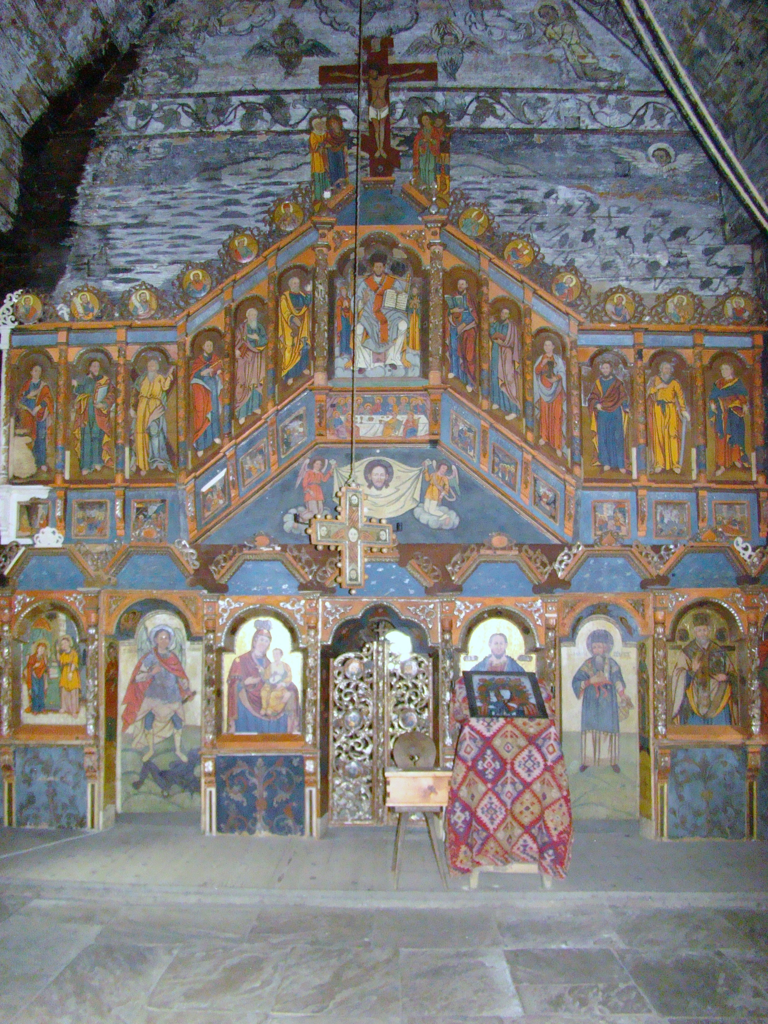 Biserica de lemn "Sfântul Nicolae", sat BOGDAN VODĂ